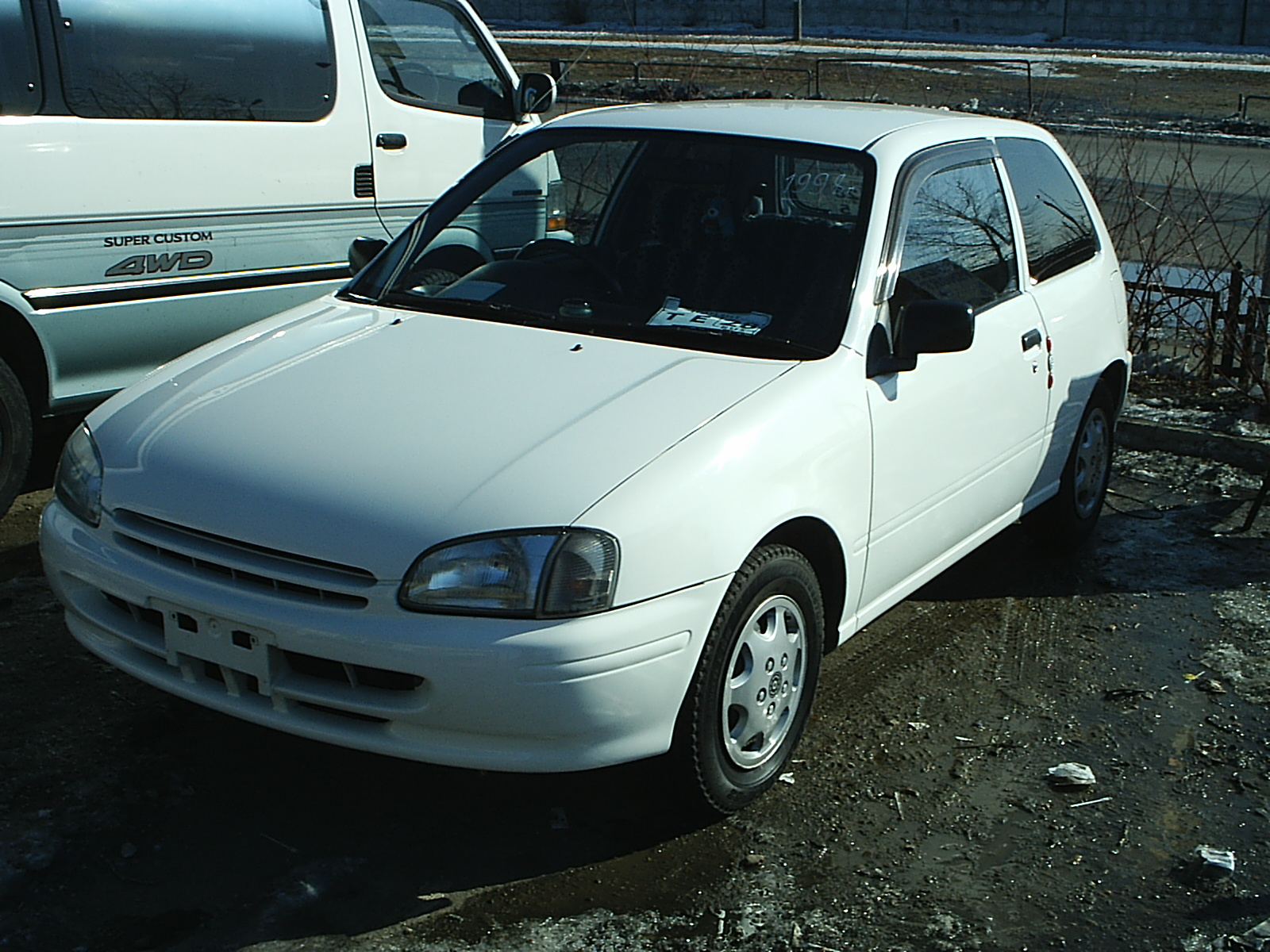 Toyota Starlet 1998